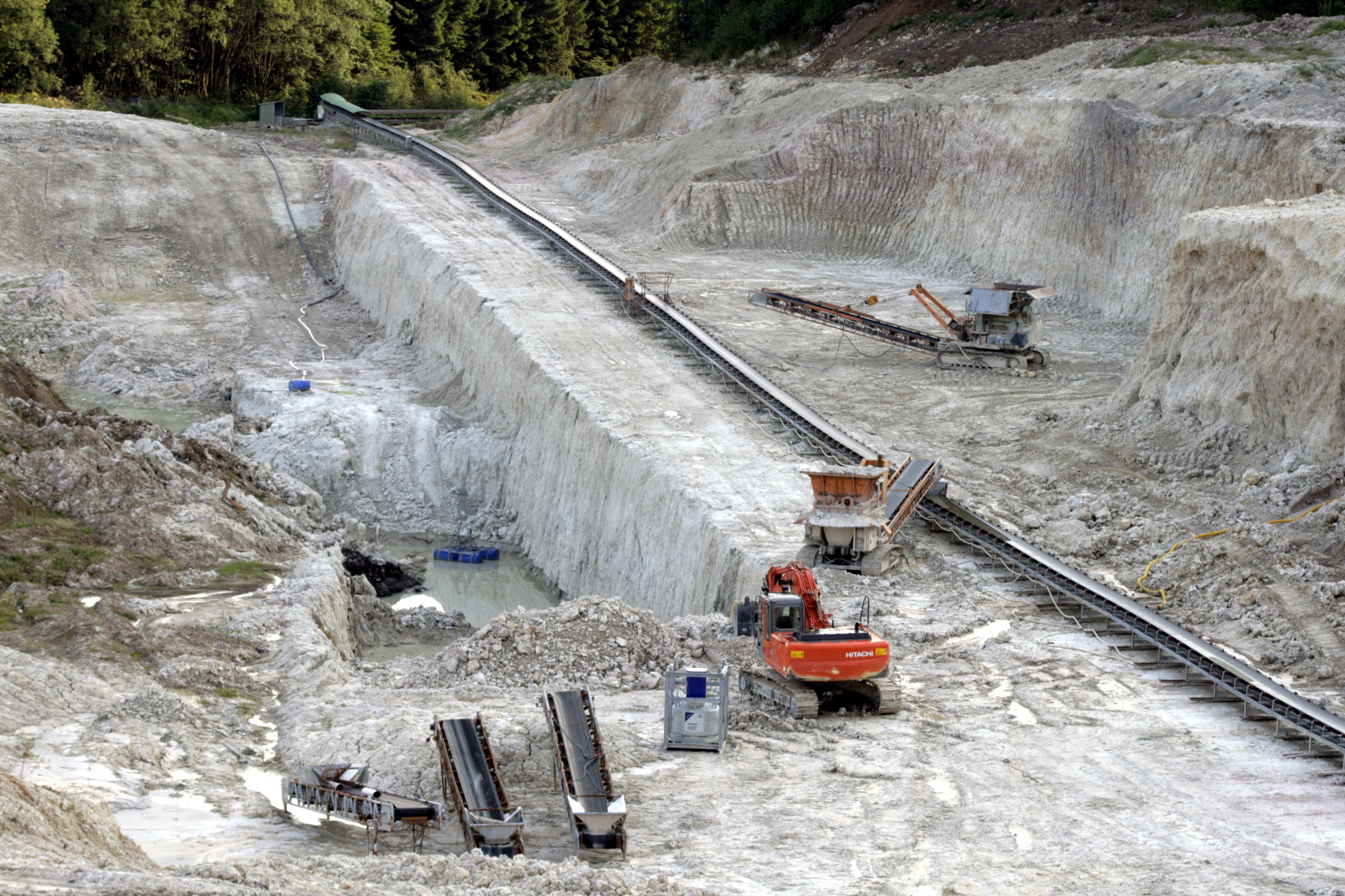 Eine der Tongruben am Hansenberg (dem Aufnahmedatum zufolge wahrscheinlich „Wimpfsfeld II“, vgl. AG Westerwald-Ton 2008[1]) nordöstlich von Mengerskirchen im östlichen Westerwald, Hessen, Deutschland. Die hier abgebauten weißen Tone stammen laut GÜK 200 aus dem Oligozän und/oder frühen Miozän.